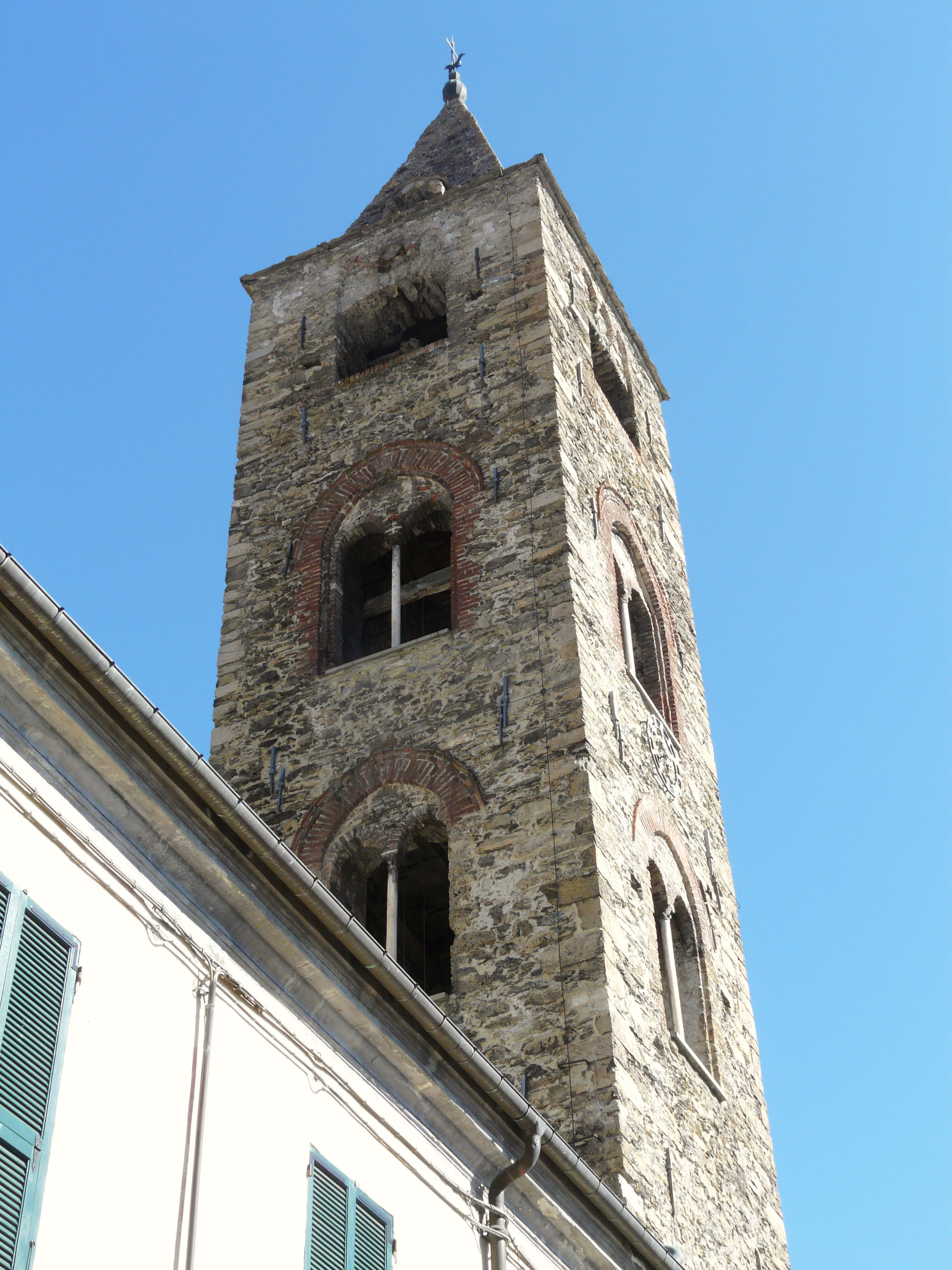 Oratorio dell'Assunta, Cosio di Arroscia, Liguria, Italia